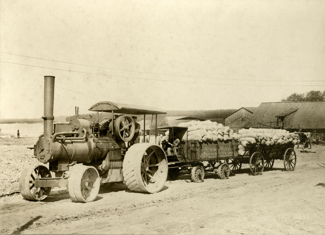 fertige, eingetütete Gur wird per Lokomobil zum Bahnhof gefahren